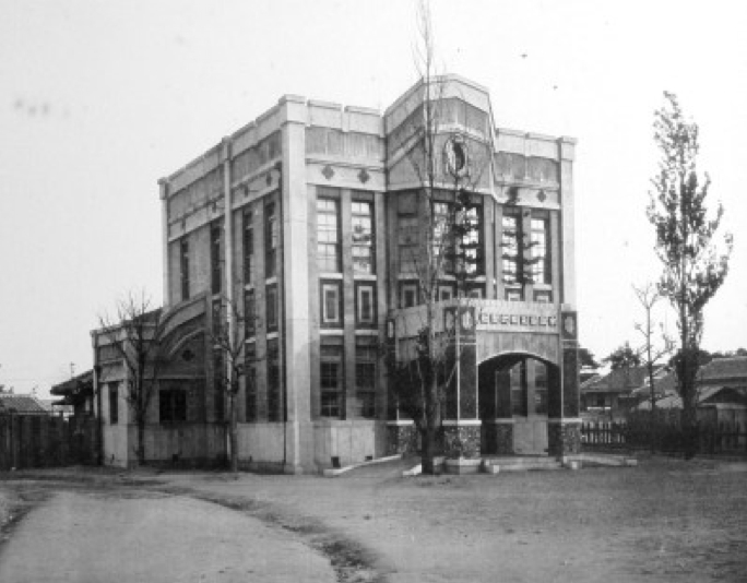 宇部市大字中宇部（当時）。宇部鉄道本社。1926年（大正15年）撮影。